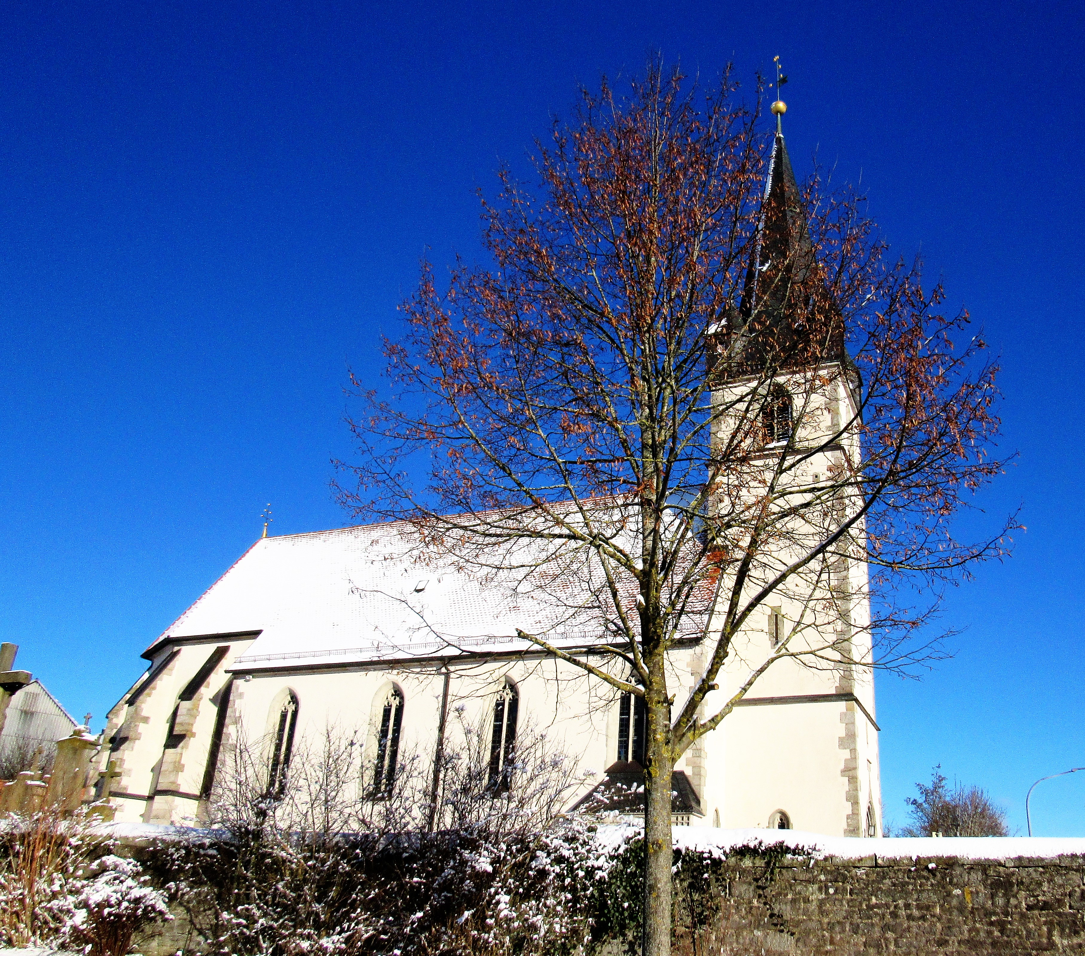 Kirche Breitenbach